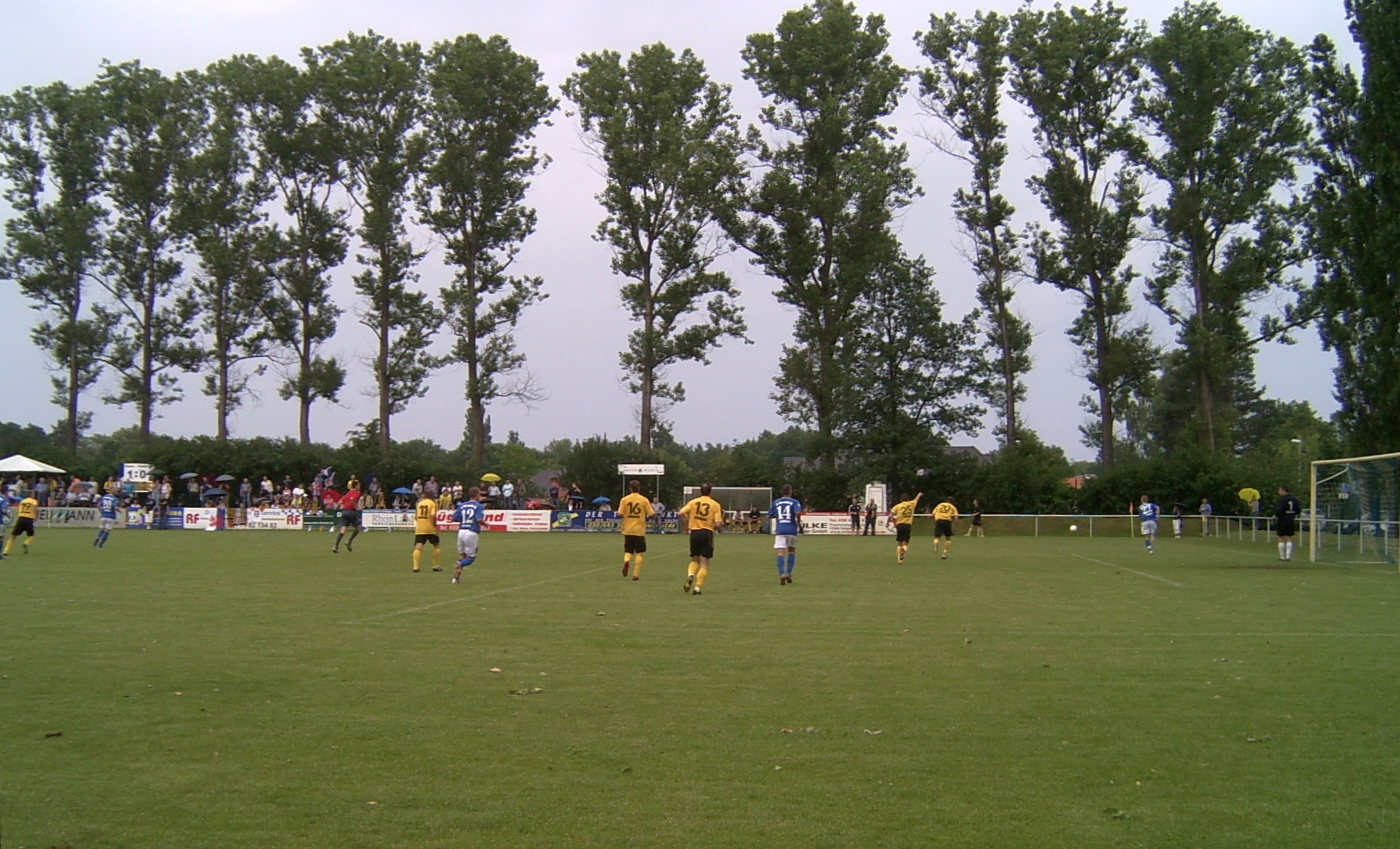 Oberligaspiel Germania 90 Schöneiche (blau-weiß) - Torgelower SV Greif (gelb-schwarz) am 30. und letzten Spieltag (27. Mai) der Saison 2006/07 im Jahn-Stadion in Schöneiche, Endstand 1:0 Schöneiche: 12 Philipp Karras; 14 Muhamet Hoxha, 20 Marcel Riediger, 22 Oliver Kunkel Torgelow: 1 Marcin Markiewicz, 11 Michal Kotula, 13 Daniel Scheinhardt, 16 Thomas Wegner, 19 Pawel Trzaska, 20 Marcel Oefele